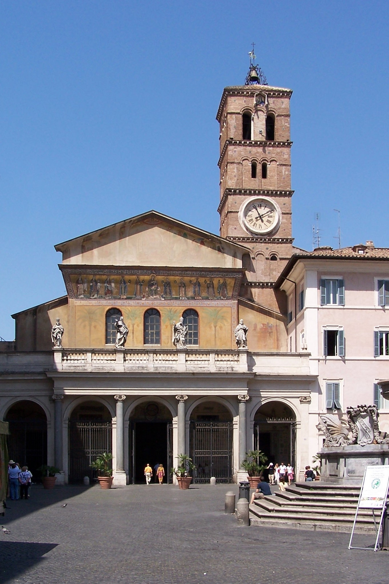 Santa Maria in Trastevere, Roma